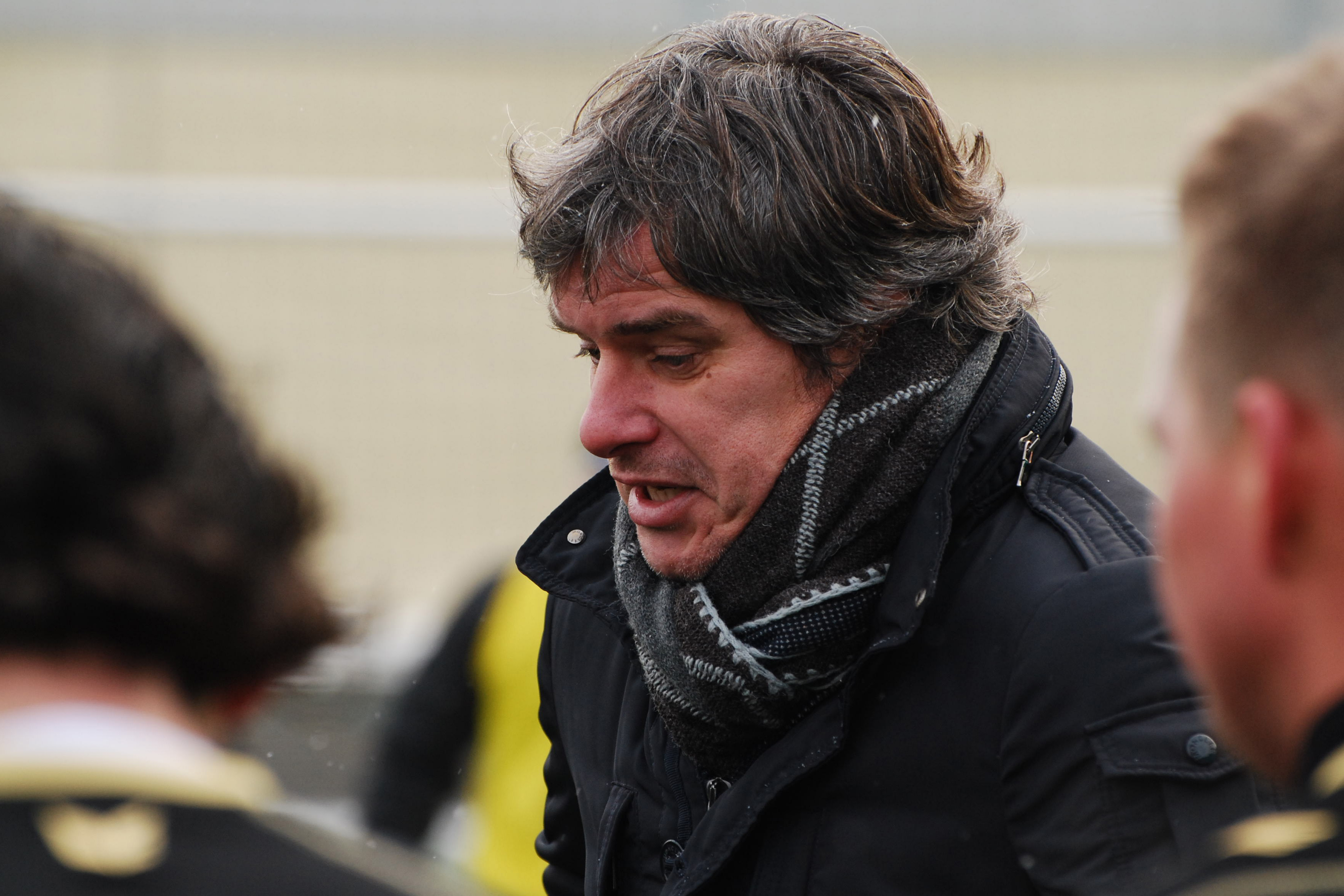 Zoran Kuntic a Szigetszentmiklósi TK vezetőedzőjeként.